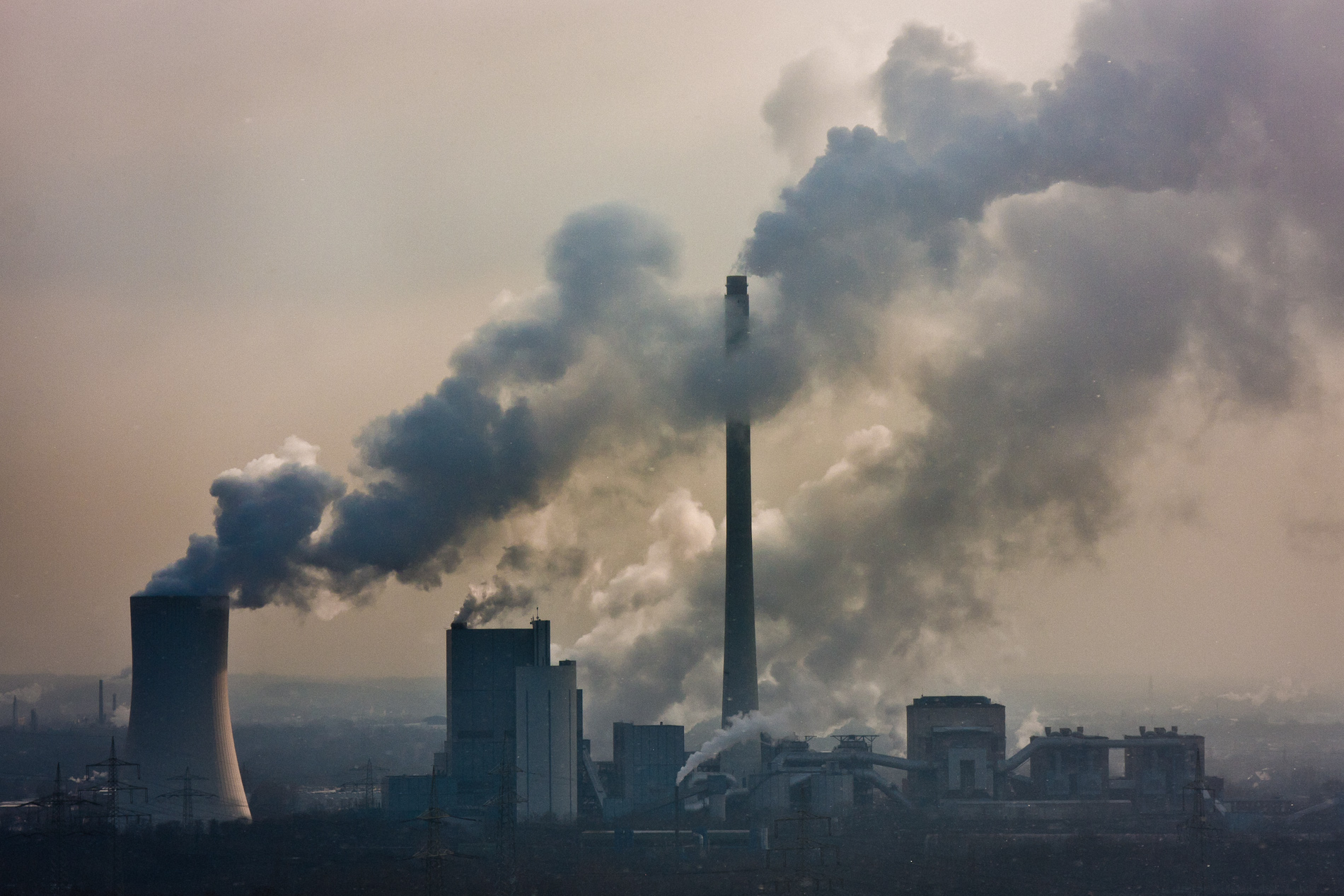 Kohlekraftwerk Herne der Steag-Gruppe unter Last am 7. Februar 2012